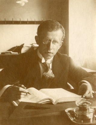 Josef Matička v roce 1919©Státní okresní archiv Svitavy se sídlem v Litomyšli